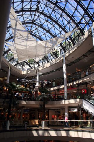 Königsgalerie Kassel Innenaufnahme